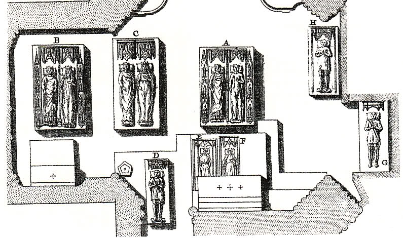 Plan de la chapelle caroline, tiré de l'ouvrage de Dom Félibien, 1706 A : Le tombeau de Charles V ; B : Le tombeau de Charles VI, C : le tombeau de Charles VII - disparu. D : Du Guesclin ; E : Bureau de La Rivière ; F : Charles, dauphin ; G : Louis de Sancerre; H : Arnaud de Barbazan